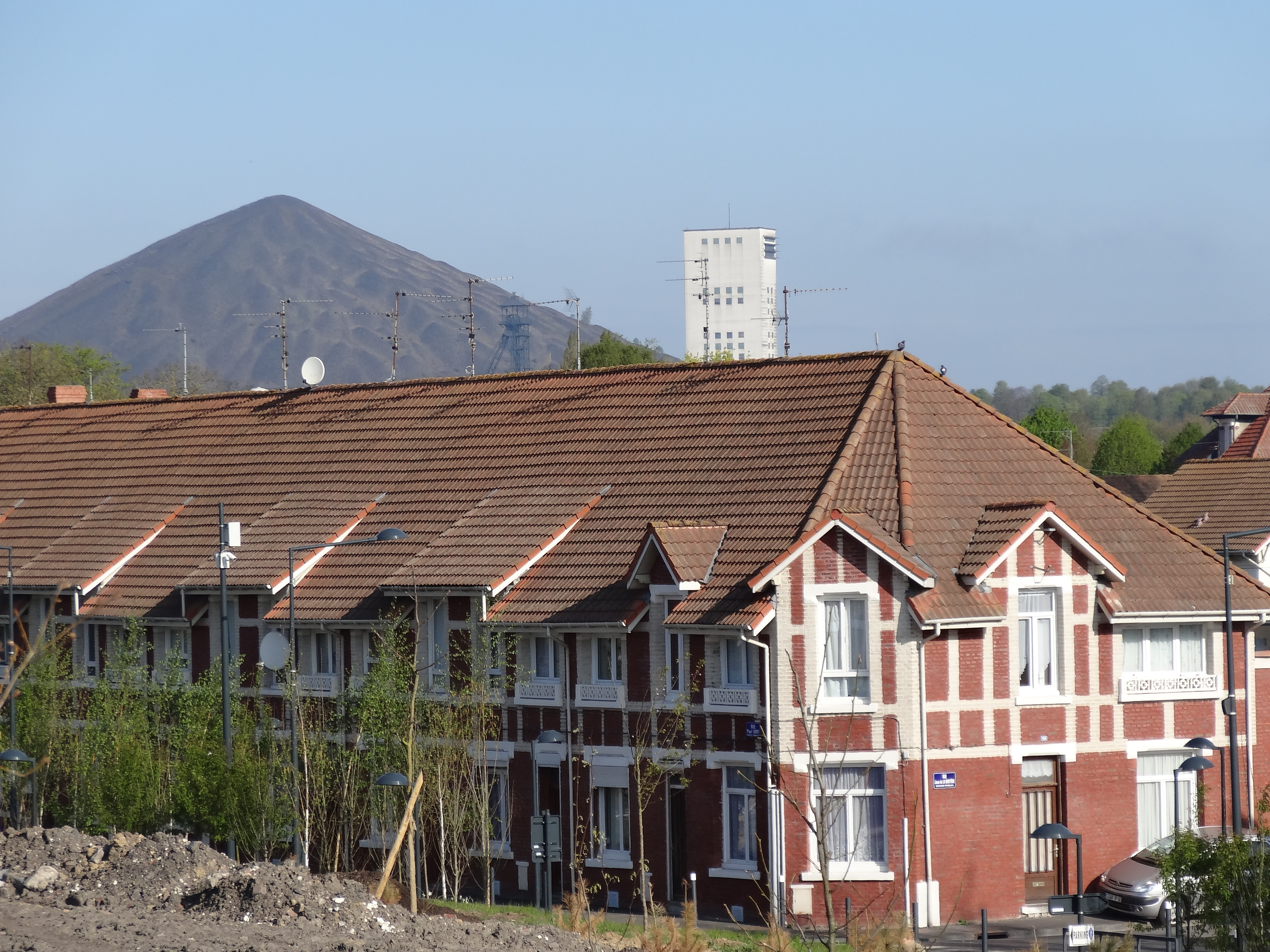 Reportage photographique réalisé le samedi 4 mai 2013 au départ de la quatrième étape de l'édition 2013 des Quatre jours de Dunkerque près du Louvre-Lens à Lens, sur le site de la fosse no 9 de la Compagnie des mines de Lens, Pas-de-Calais, Nord-Pas-de-Calais, France, dans le bassin minier du Nord-Pas-de-Calais.